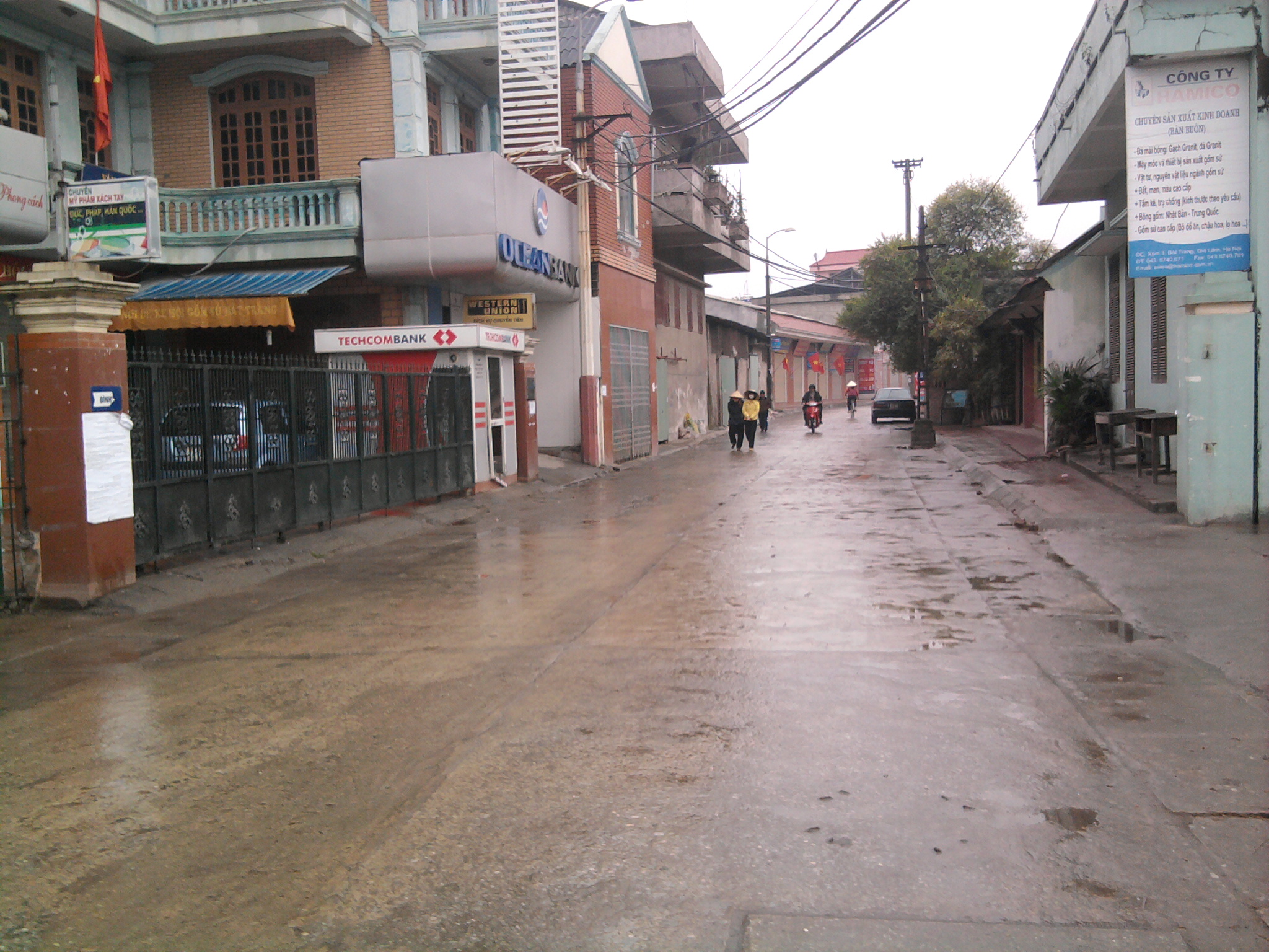 Đường phố của xã Bát Tràng, huyện Gia Lâm, Hà Nội sáng mồng Năm Tết Nhâm Thìn (2012).